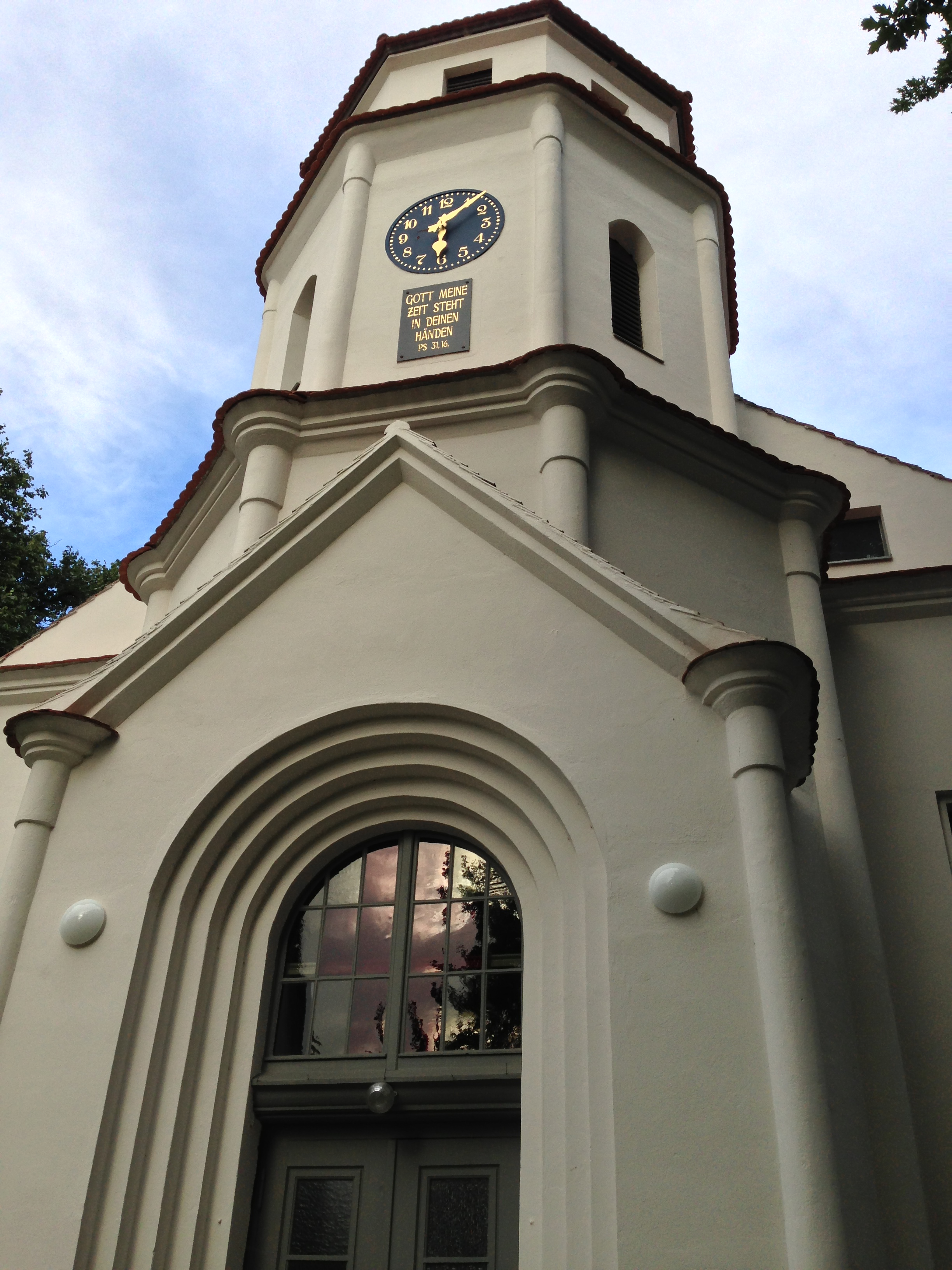 Radwegkirche mit Cafe in Kienitz (Letschin, Brandenburg)